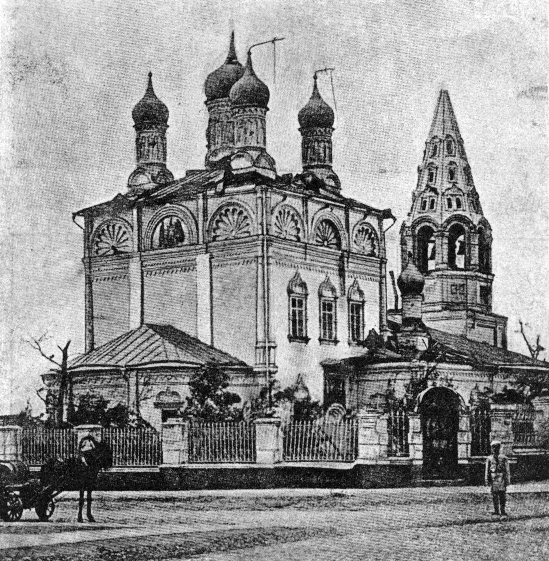 Смерч 1904 года в Москве. Повреждённая ураганом церковь свв. Петра и Павла в Лефортово